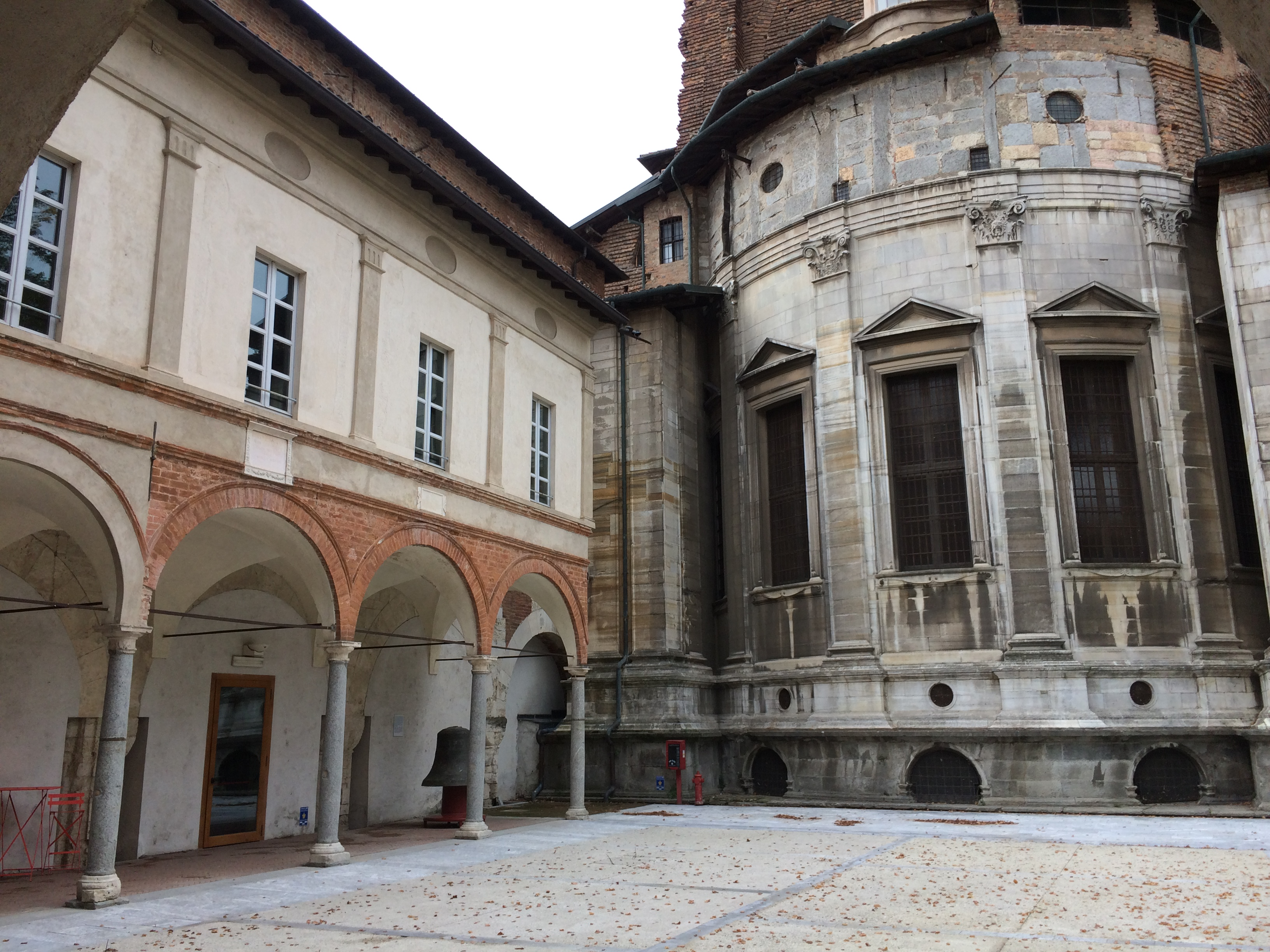 Palazzo del Broletto, l'antico palazzo comunale di Pavia This is a photo of a monument which is part of cultural heritage of Italy.